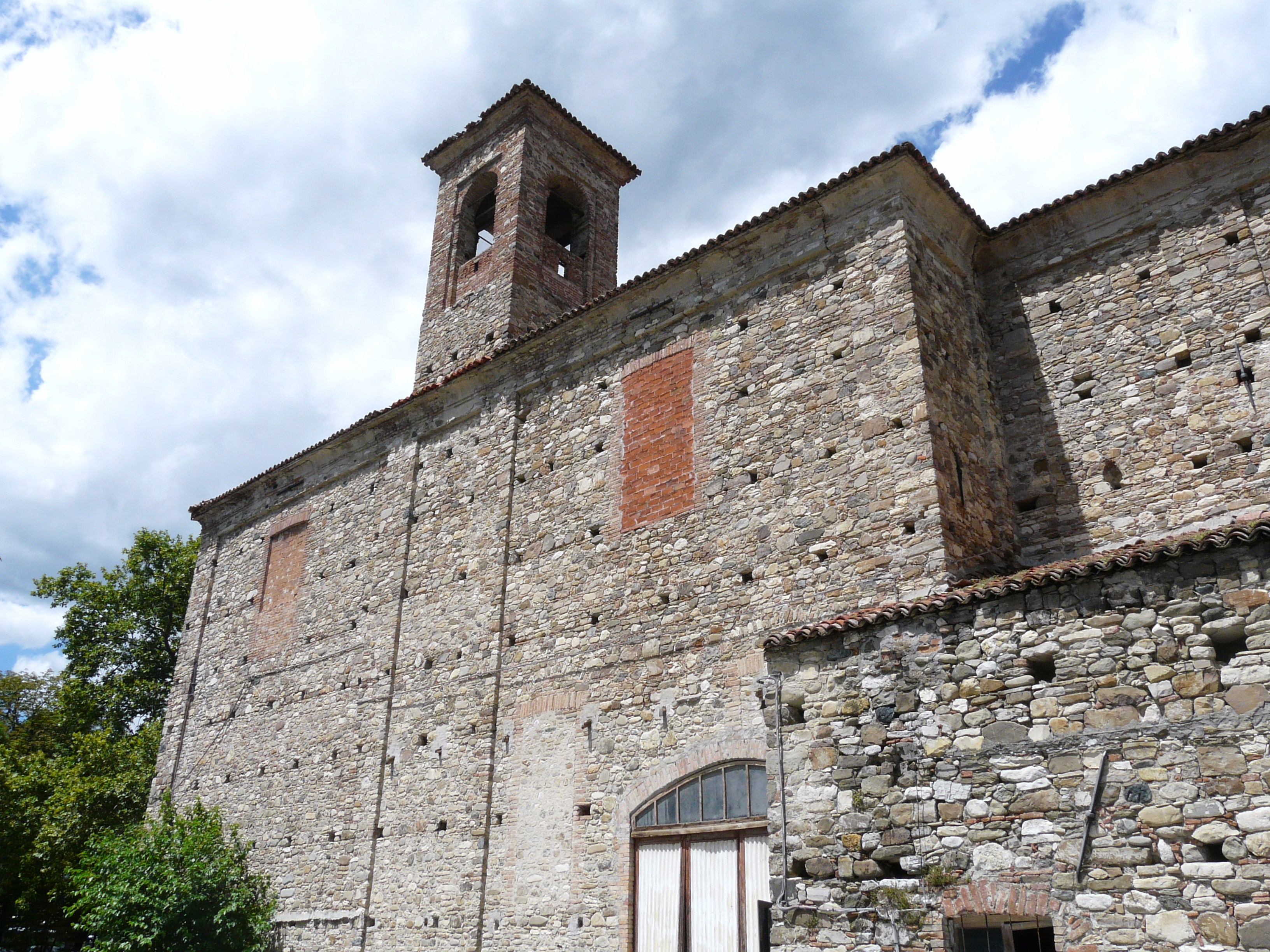 Immagini del monastero di San Francesco di Bobbio, Emilia-Romagna, Italia